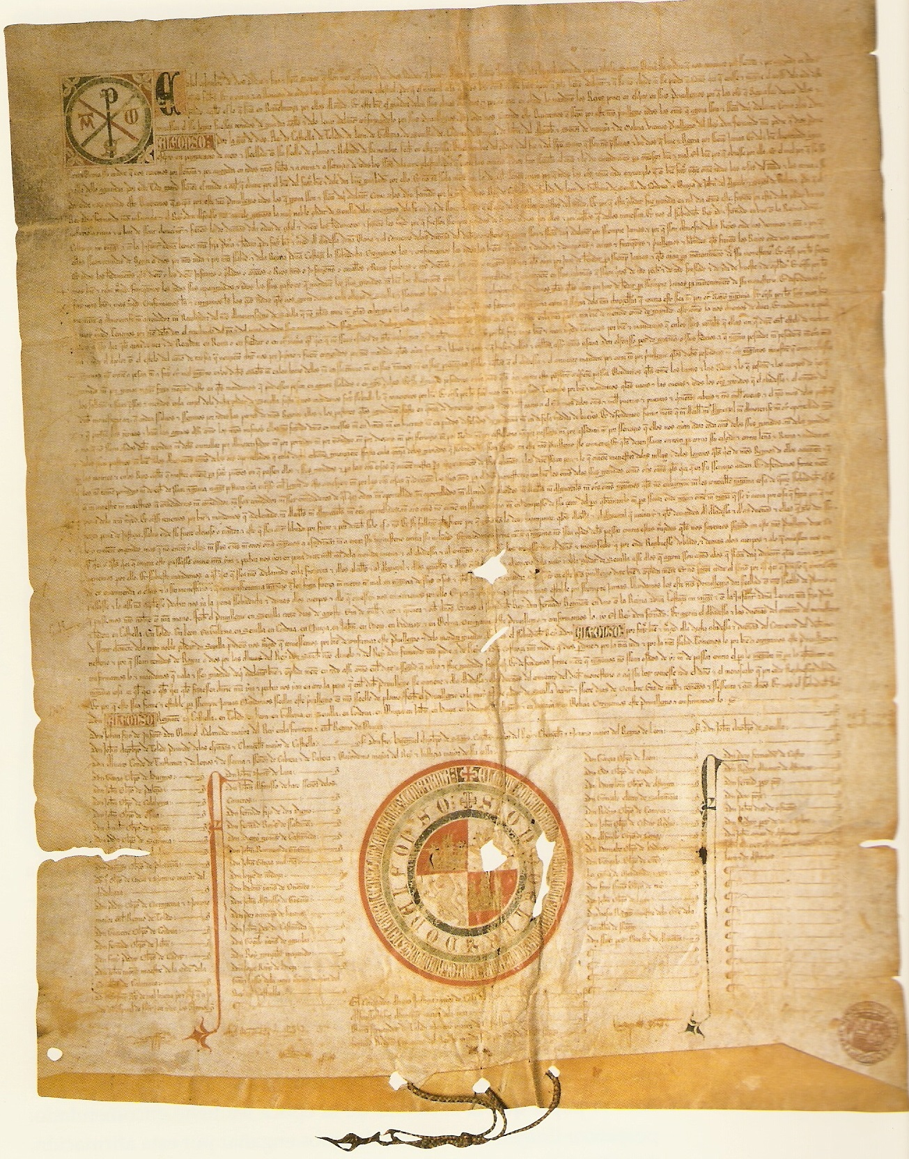 Privilegio rodado emitido por el rey Alfonso XI de Castilla el día 27 de octubre de 1327 por el que confirma el privilegio que su padre, Fernando IV de Castilla, concedió al monasterio de San Clemente de Sevilla, en el que le concedía ciertas exenciones y privilegios. El documento se custodia en el monasterio de San Clemente de Sevilla, provincia de Sevilla (España).